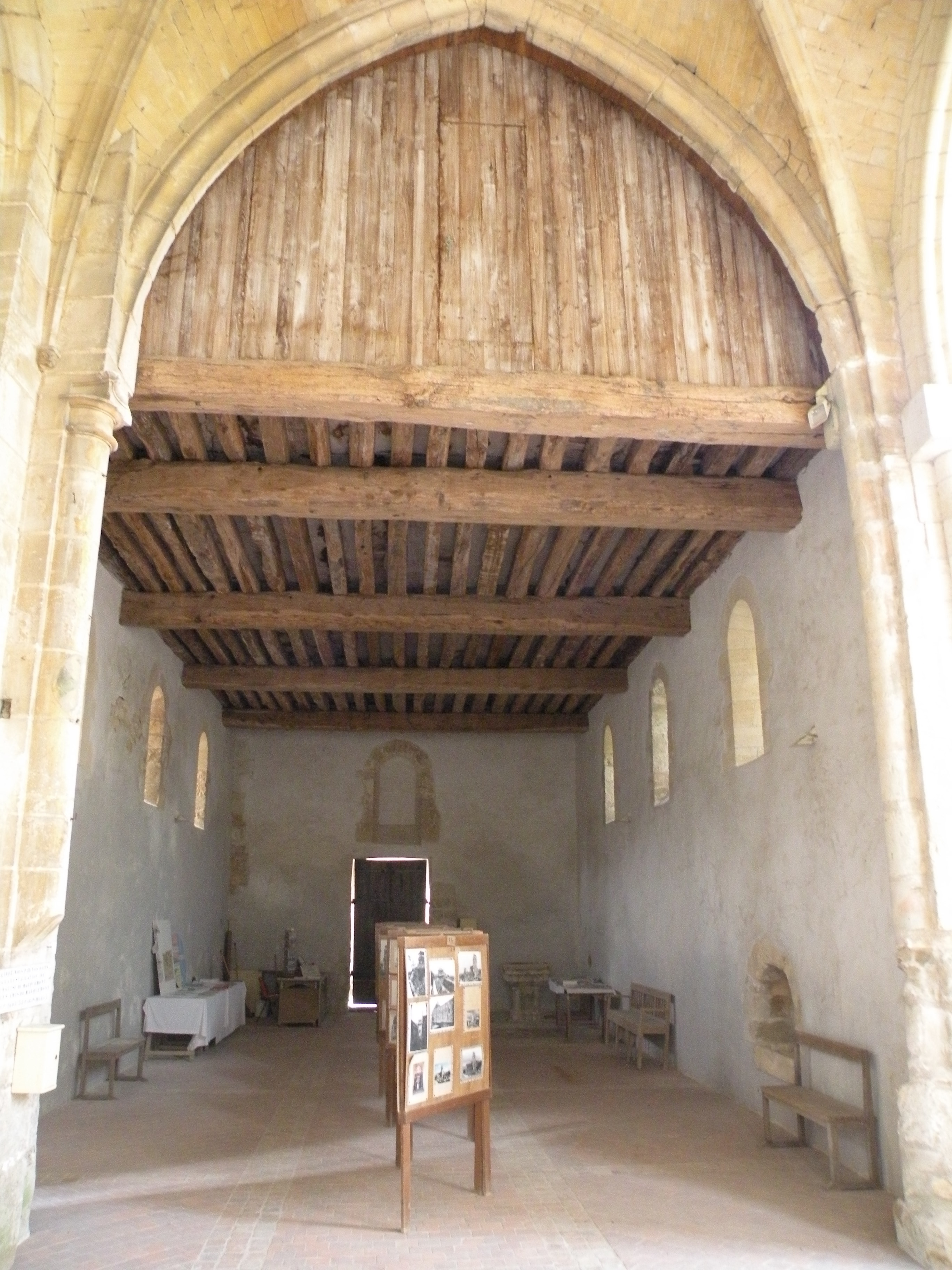 nef de l'Église Saint-Martin de Marquemont